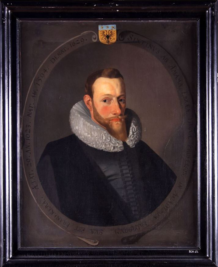 Sixtinus (ab) Amama (Franeker, 13 oktober 1593 - Franeker, 9 november 1629) was een Nederlands hoogleraar Oosterse talen.